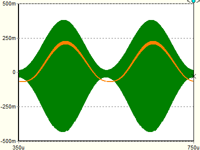 AM Signal (grün) und Hüllkurve (blau) bei Seriengleichrichter mit Halbleiterdiode